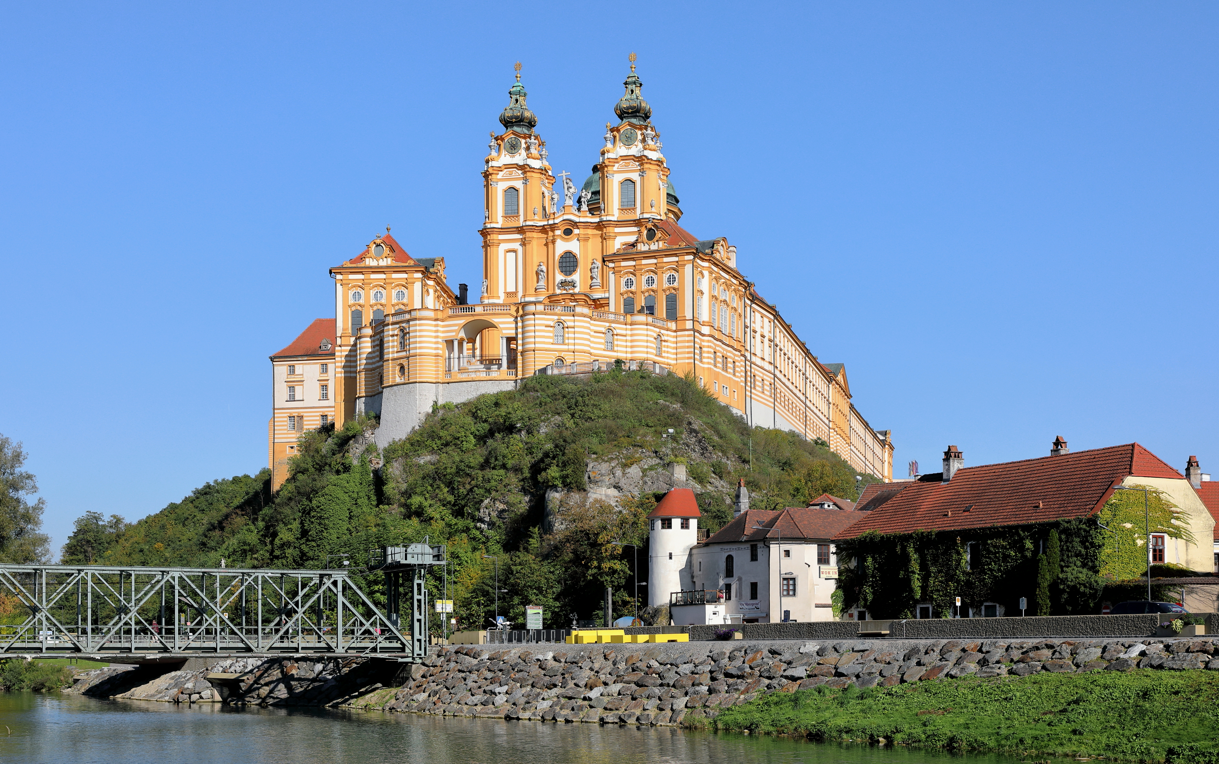 Westsüdwestansicht des 1089 gegründeten Benediktinerstiftes in der niederösterreichischen Stadtgemeinde Melk und im Vordergrund der Kramerturm an der Ecke Nibelungenlände/Kremser Straße sowie die denkmalgeschützte Stahlhubbrücke über den Donauarm.Die Stiftsanlage wurde in der 1. Hälfte des 18. Jahrhundert grundlegend umgebaut sowie erweitert und erhielt dabei im Wesentlichen ihr heutiges Erscheinungsbild.